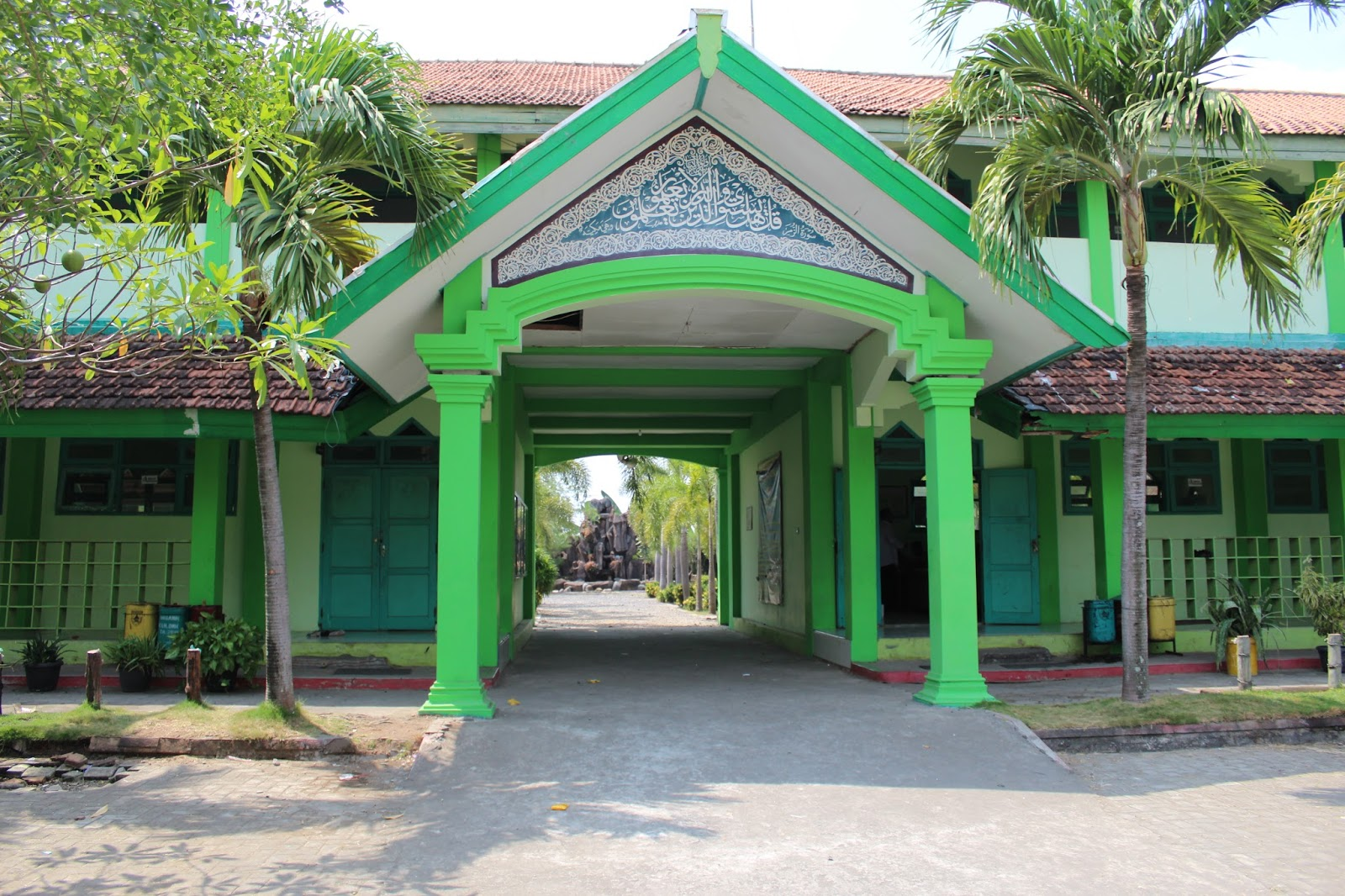 MTs N 3 Demak